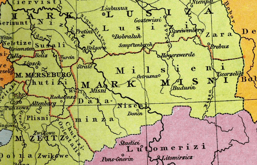 Heiliges Römisches Reich um 1000, Ausschnitt Markgrafschaft Meißen